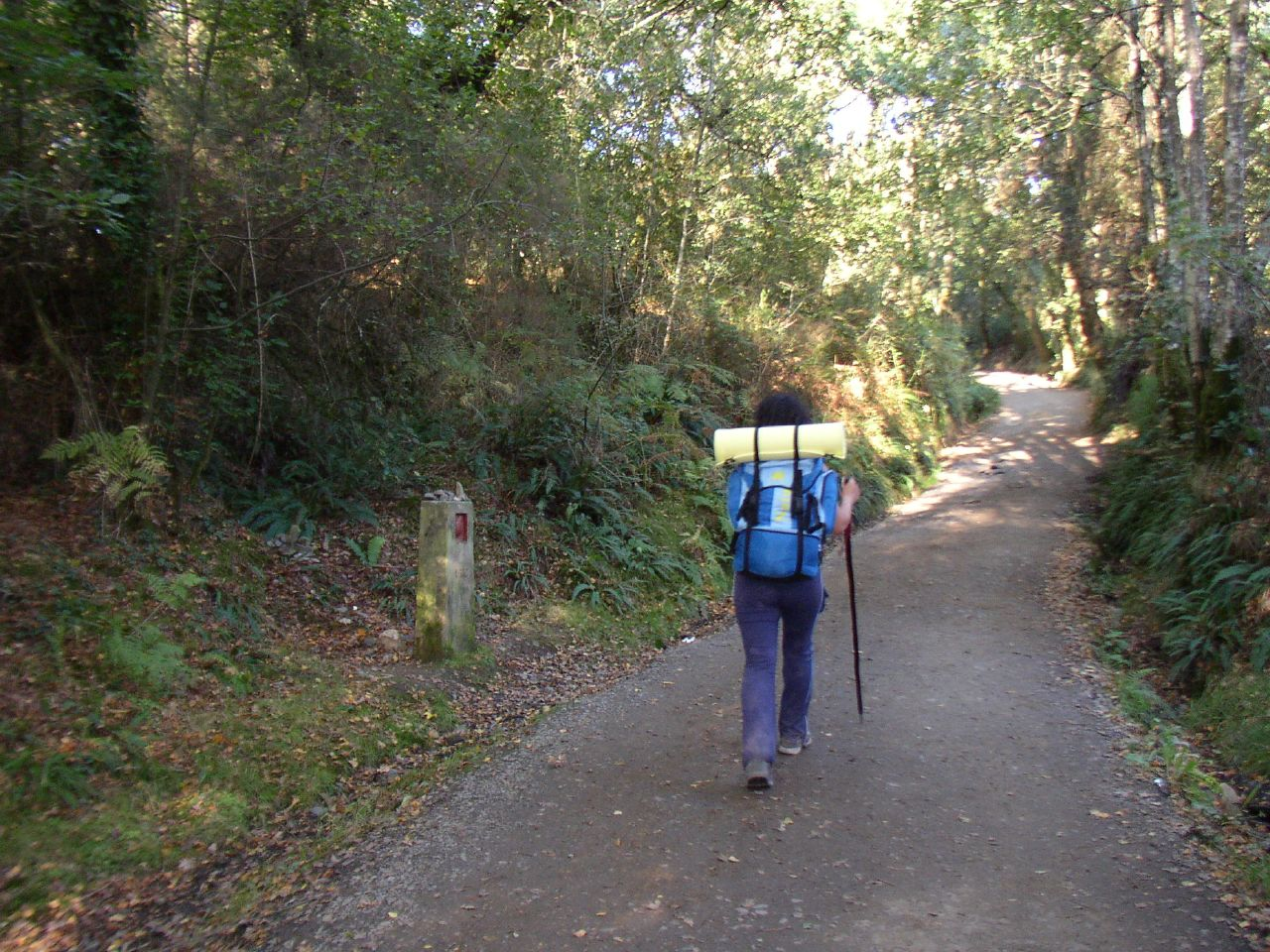 Caminando